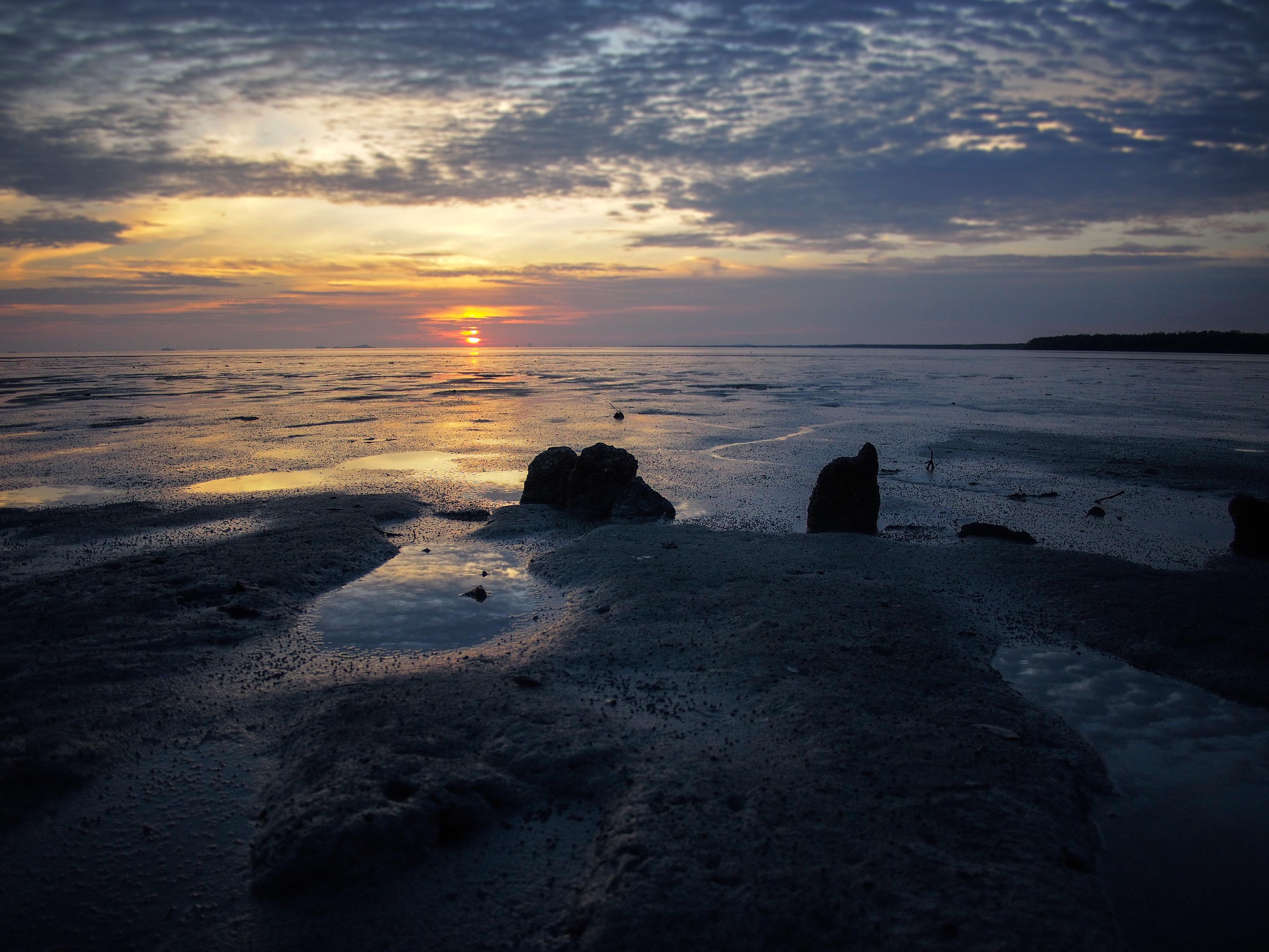 Senja di Tanjung Muar